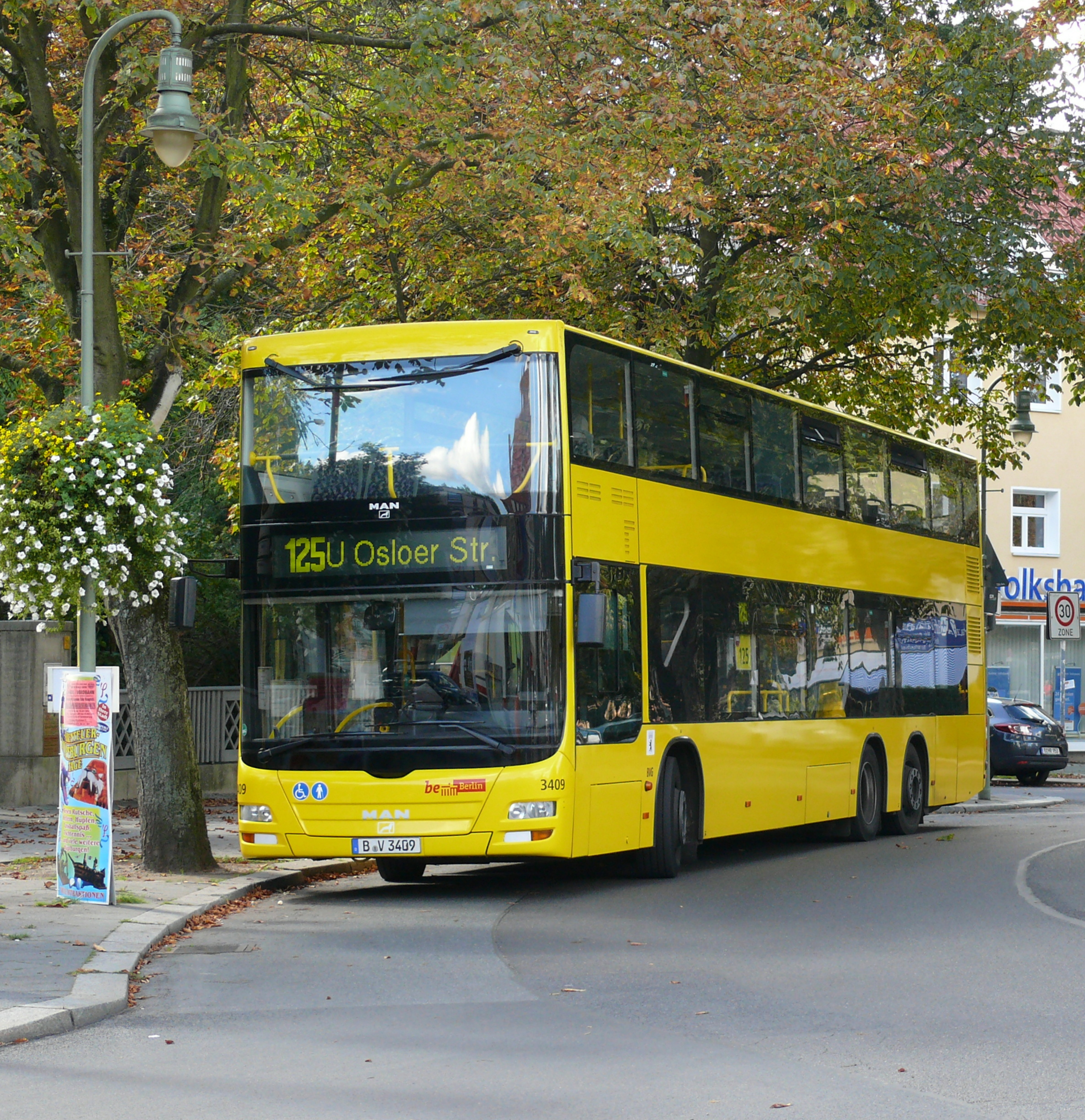 Berlin-Frohnau Ludolfingerplatz MAN Lion’s City Doppeldecker der BVG